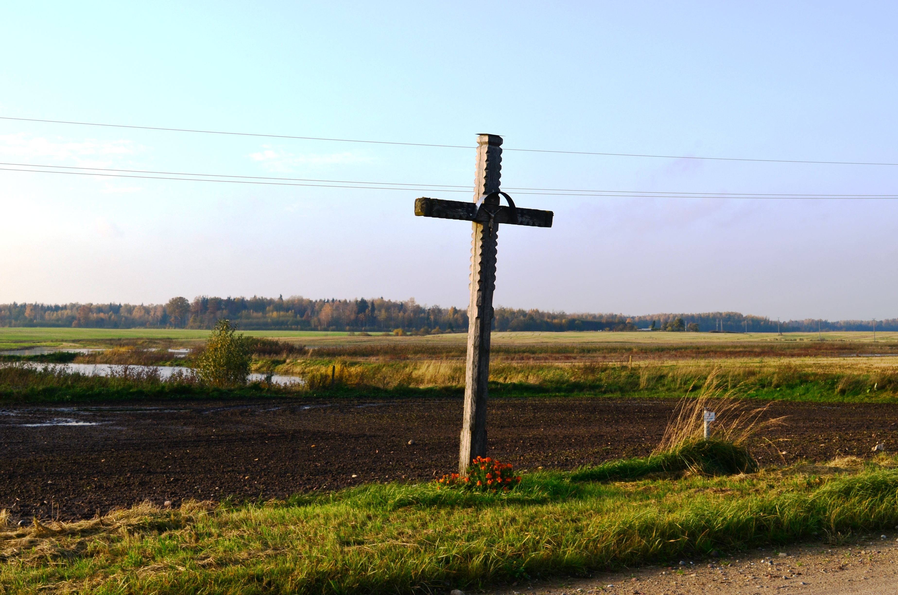 Maulių kaimo kryžius, Kėdainių raj.